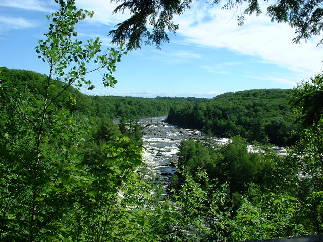 Chutes des Ailes sur la Rivière Batiscan (Québec) Canada